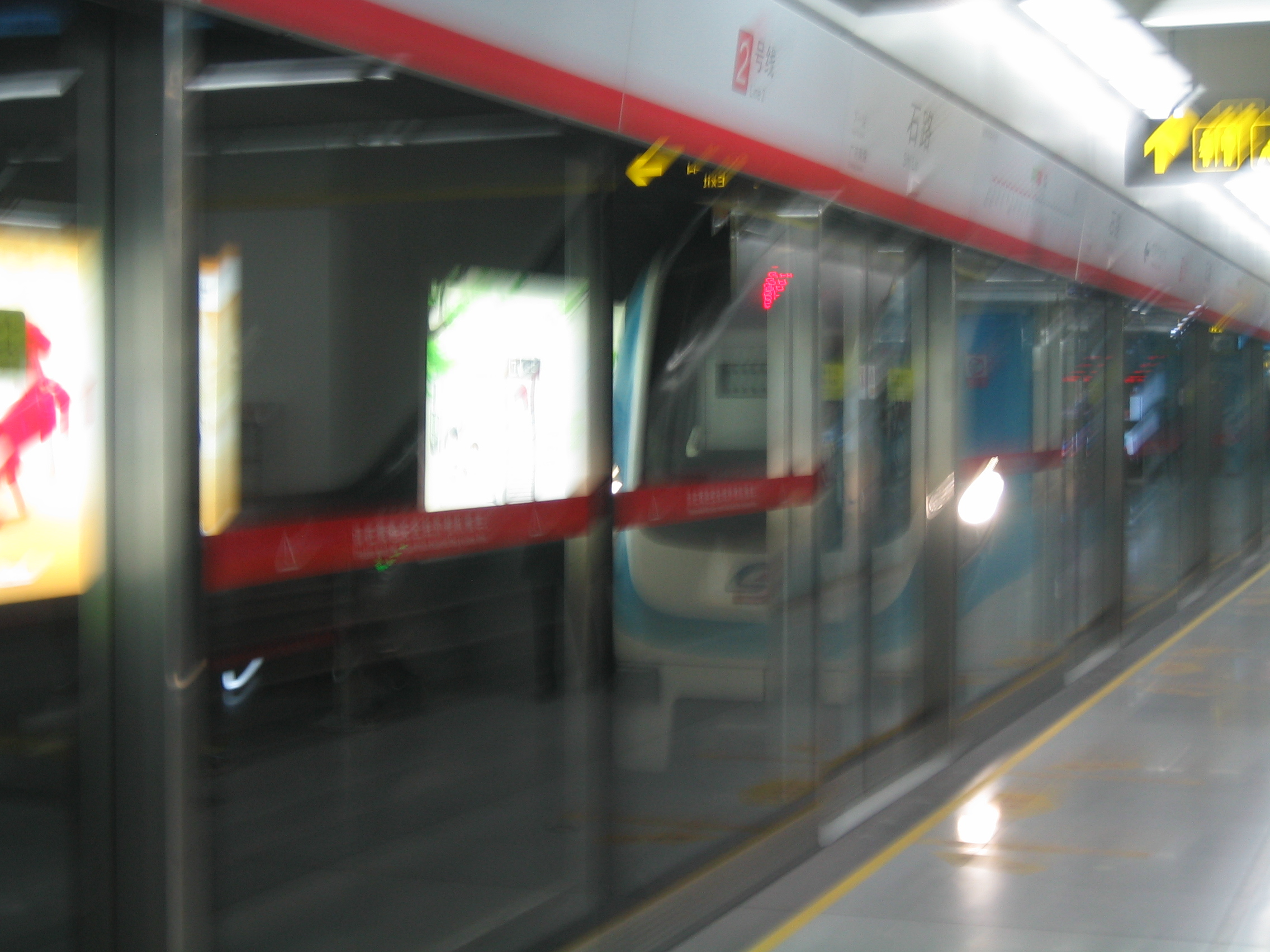 苏州地铁2号线列车